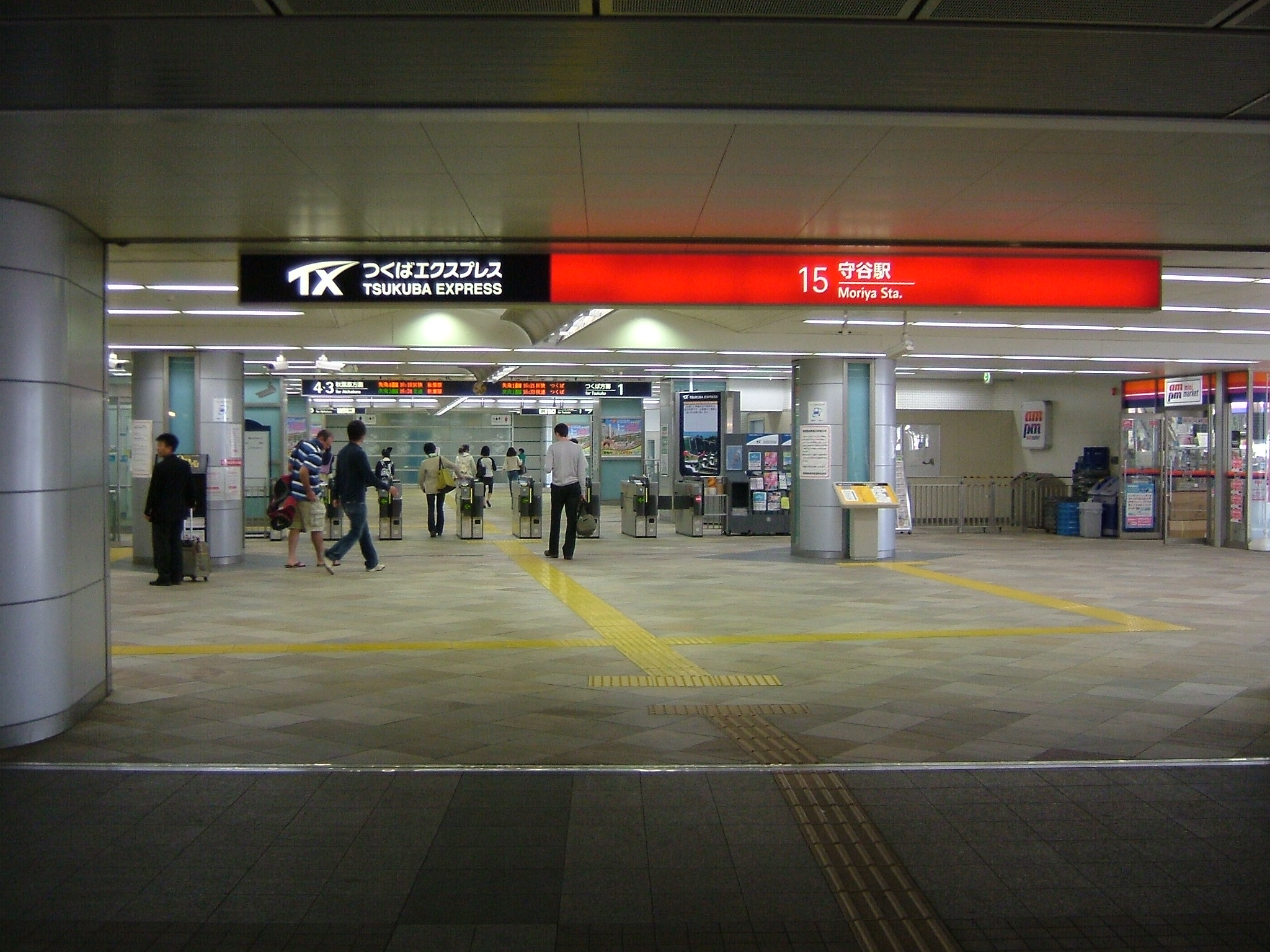 つくばエクスプレス守谷駅改札口